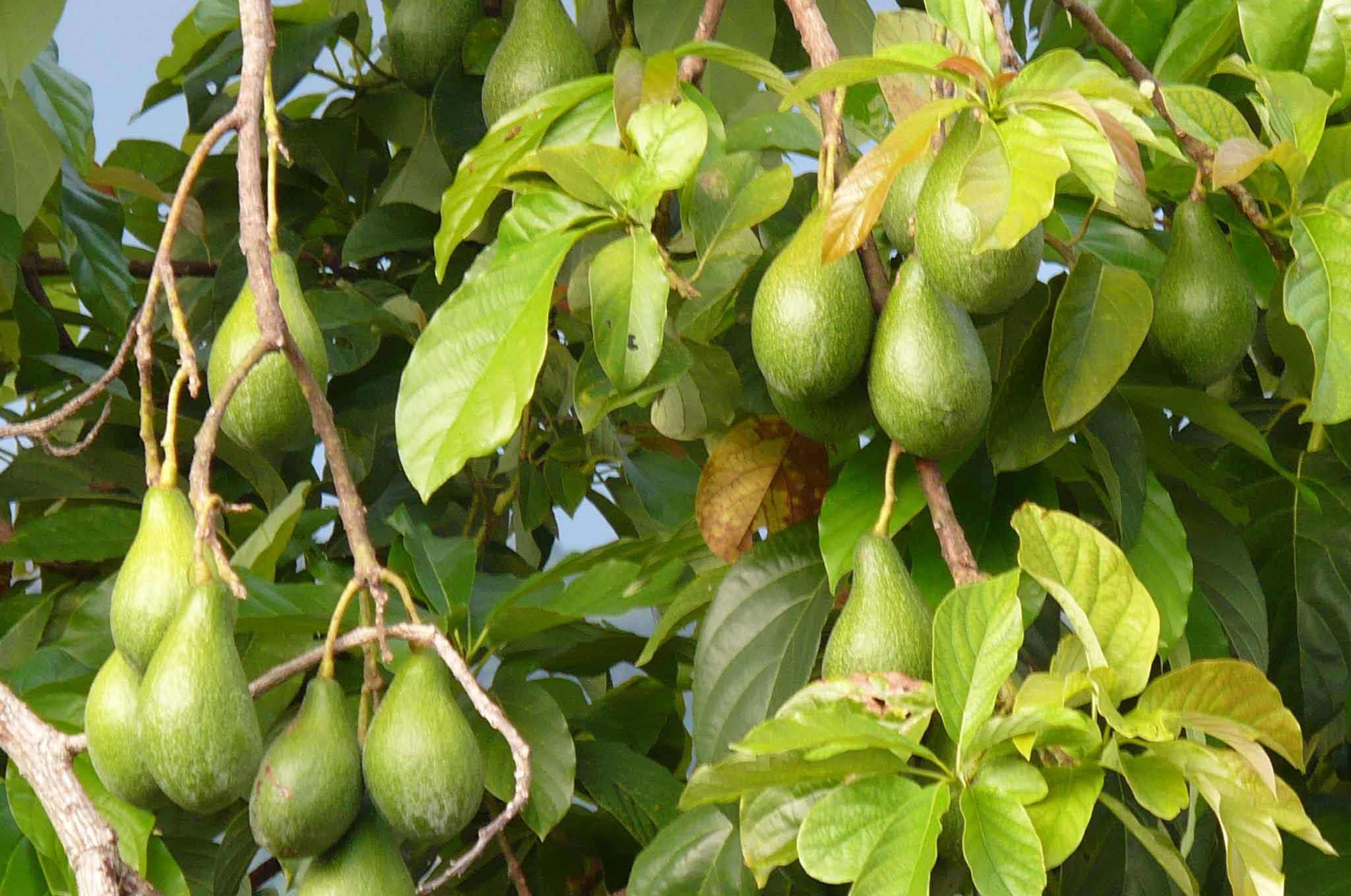 Familia lauraceae